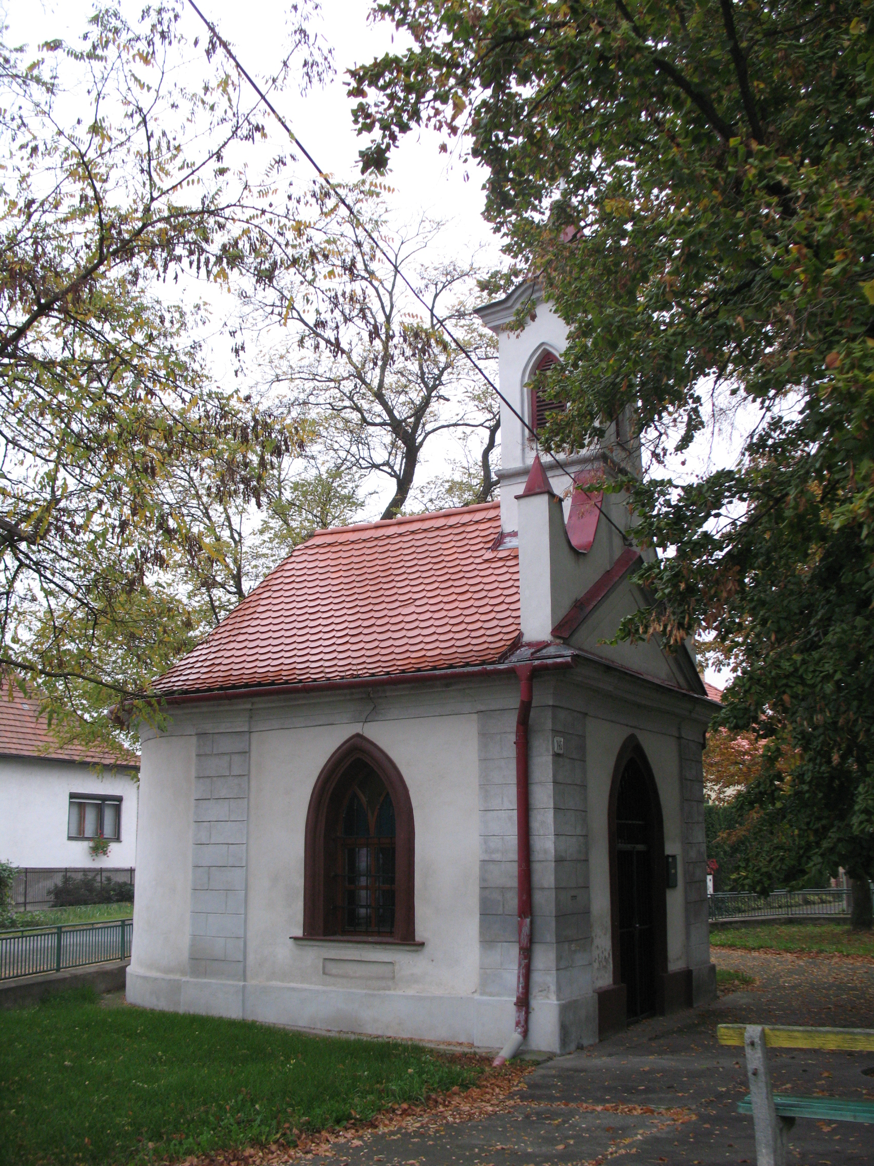 Nagybélic